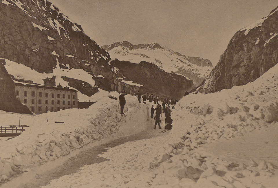 Durchbrechen einer Lawine beim Urnerloch. Im Hintergrund die Bühl-Kaserne. Andermatt UR, Schweiz